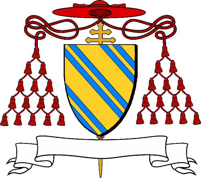 En aour e deir eilenn en glazur sourinet